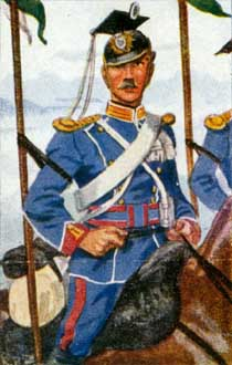 Sächsische Artillerie, Pioniere und Train 1871; Ulan d. Sächs. 2. Rgt.